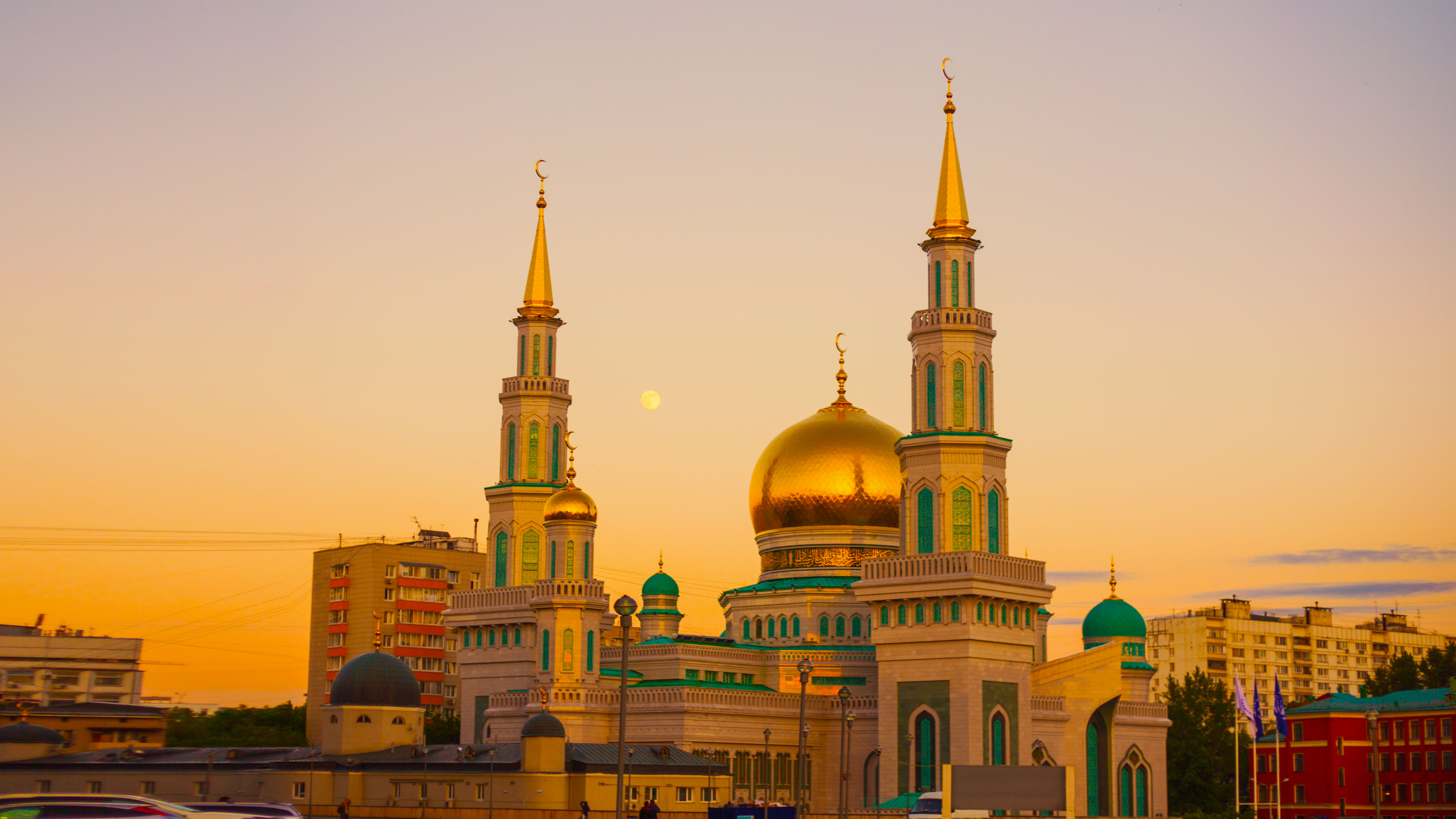 Московская соборная мечеть Автор: Khusen Rustamov (Хусен Рустамов)